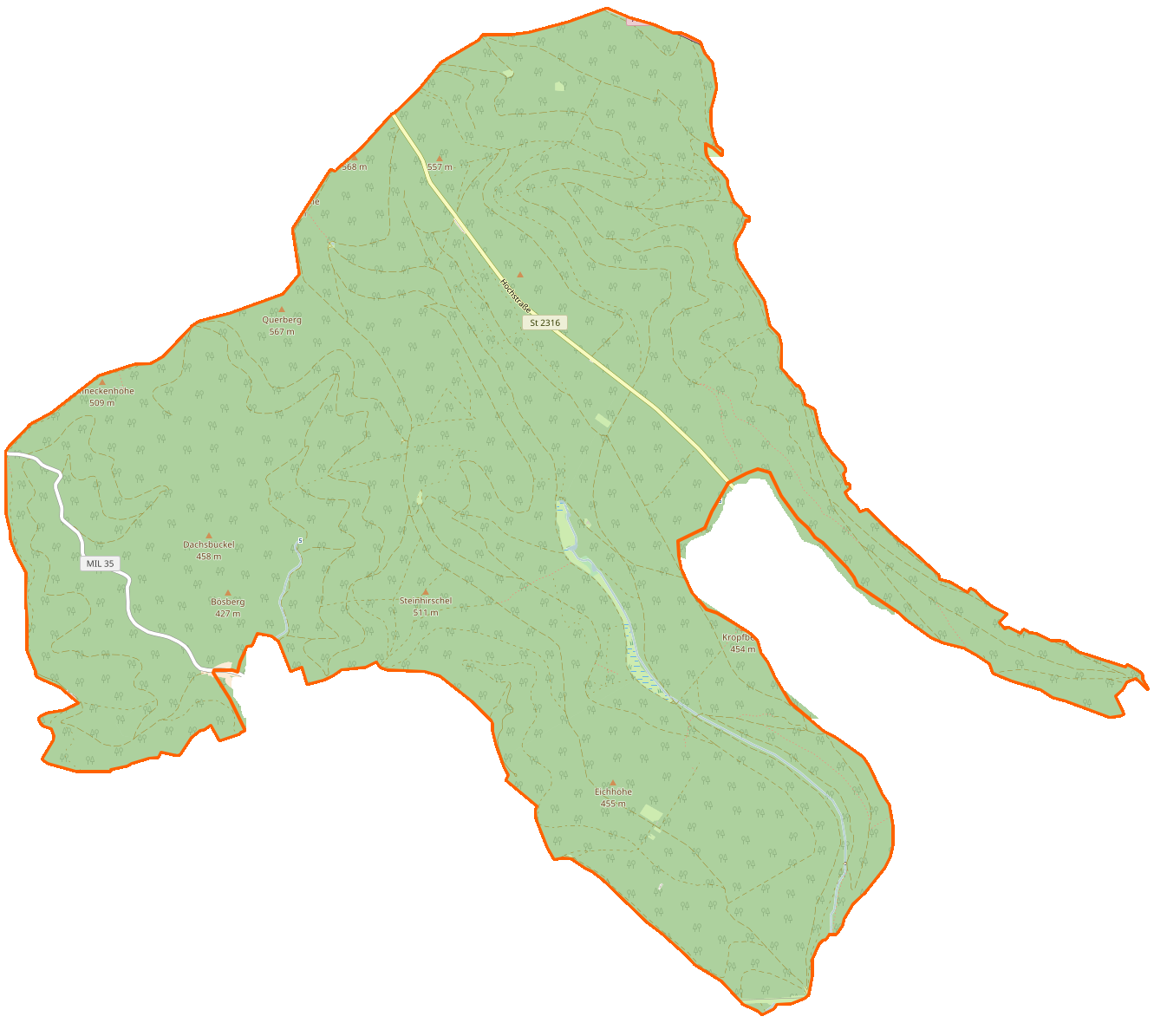 Gemarkung Altenbucher Forst